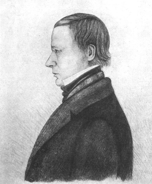 Johan Otto Wedberg arvtagare till Lidingsberg på Lidingö, portätterad på en blyertsteckning av Ettan Lindeberg omkring 1850.